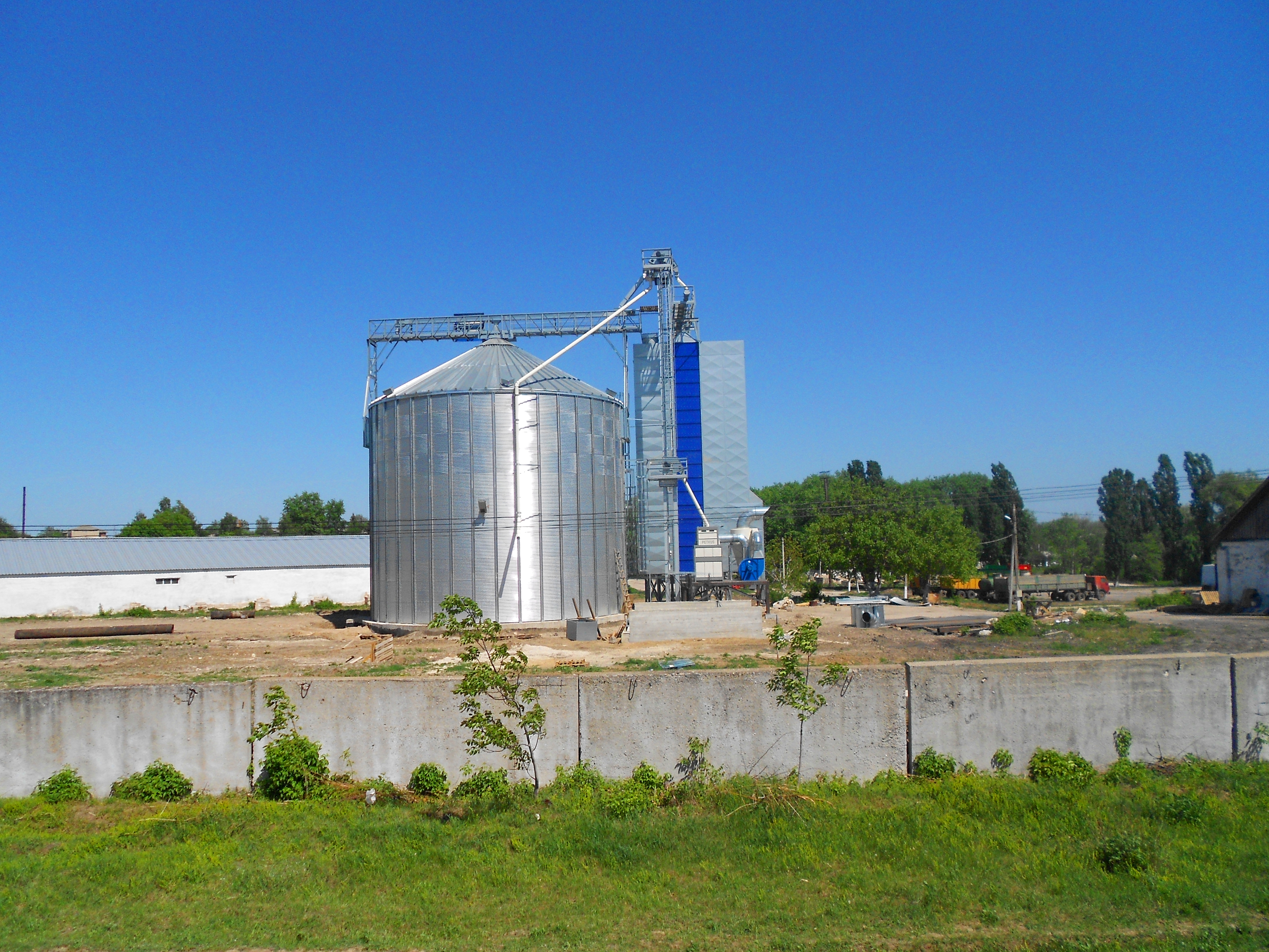 Compania "Agroelit" din Târnova, r. Dondușeni